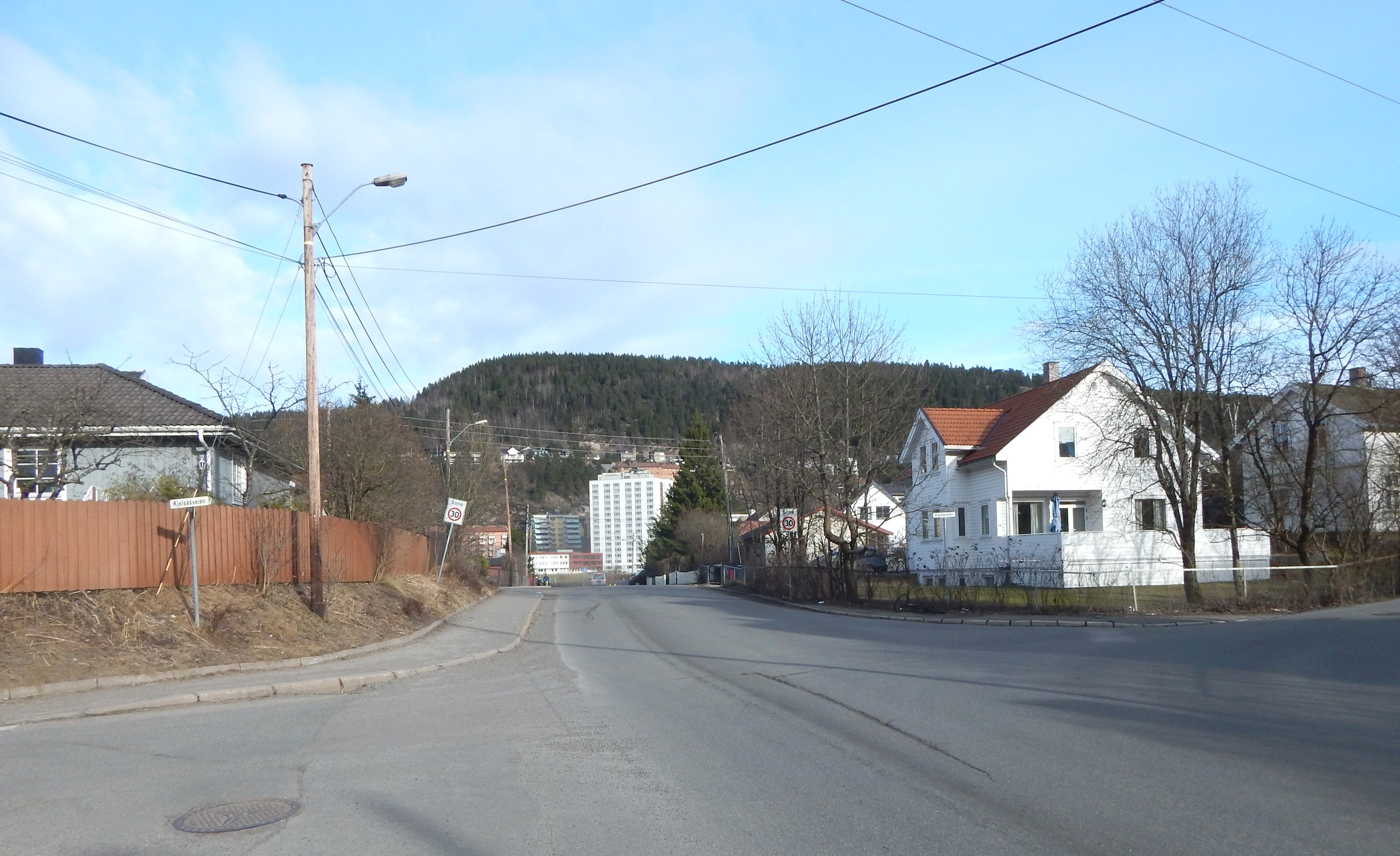 Myrerskogveien sett fra krysset ved Kjelsåsveien